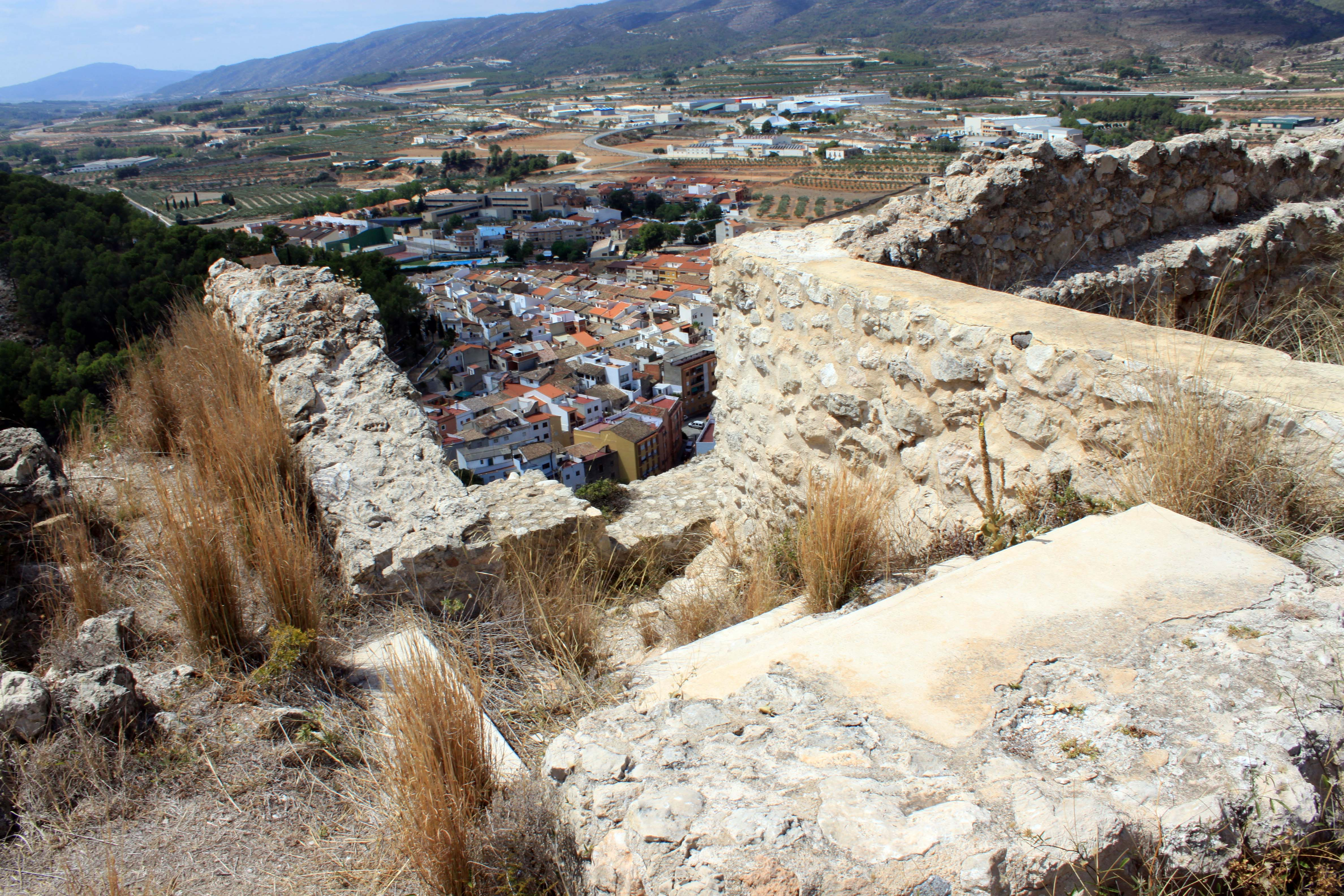 Vista de los restos del castillo de la localidad de Moixent, provincia de Valencia, Comunidad Valenciana, España.